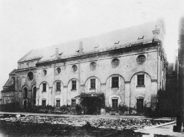 München, die Karl-Borromäus-Kirche des Paulanerklosters in der Au